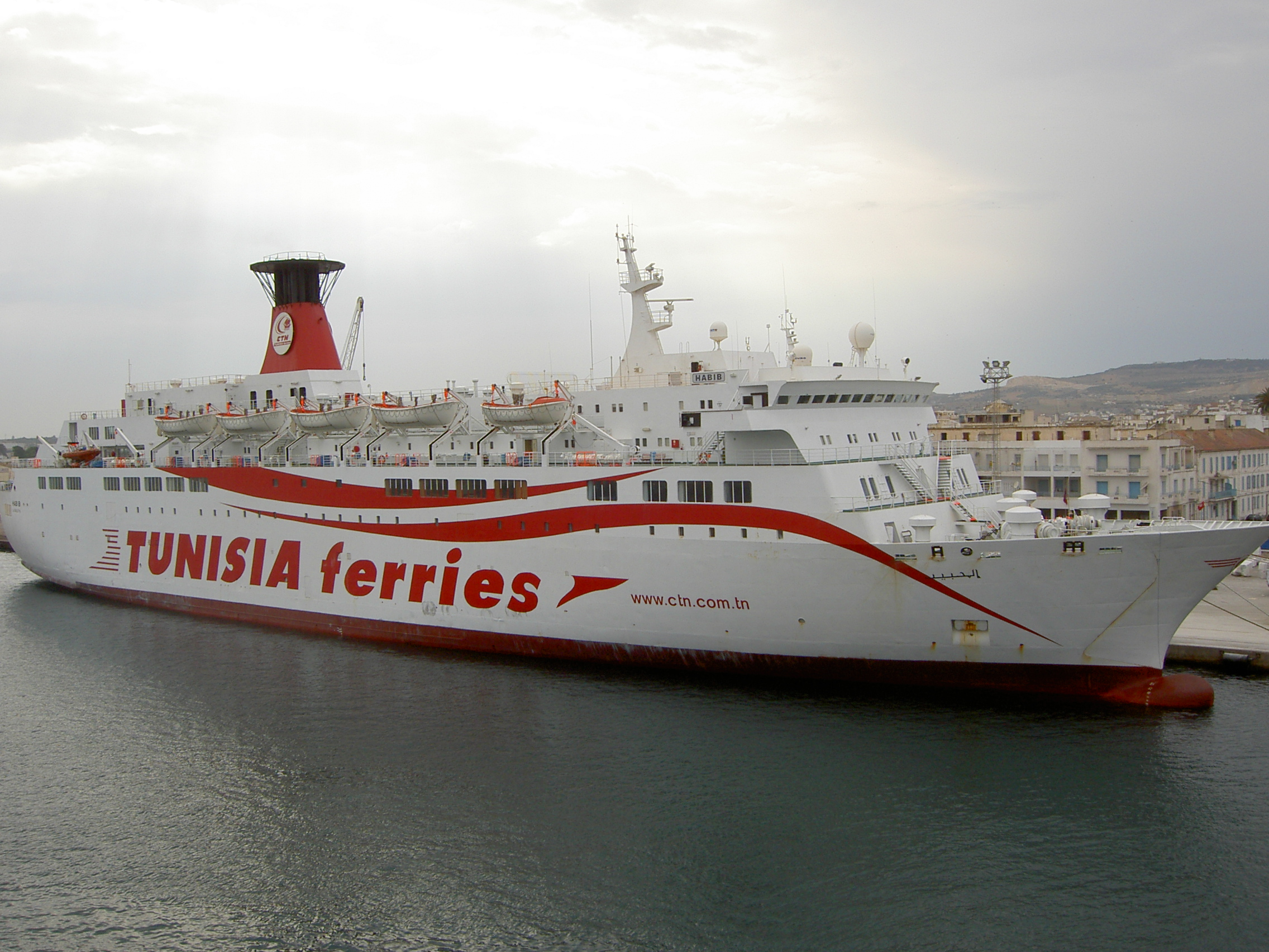 Bateau El Habib (CTN, Compagnie Tunisienne de Navigation ou Tunisia Ferries) accosté à Bizerte, Tunisie.